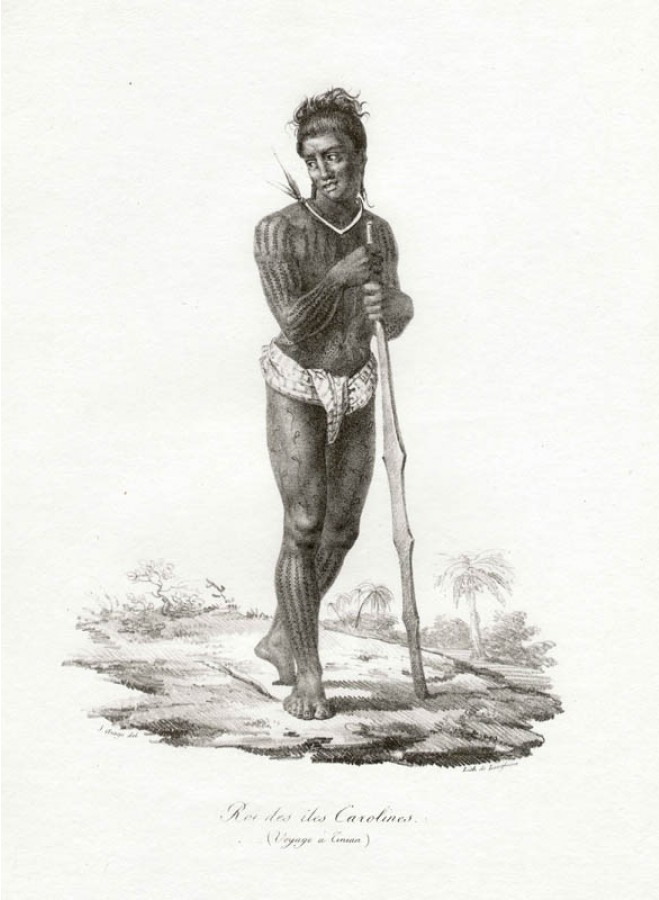 Roi des Carolines par Jacques Arago lors du voyage de Louis Claude de Saulces de Freycinet